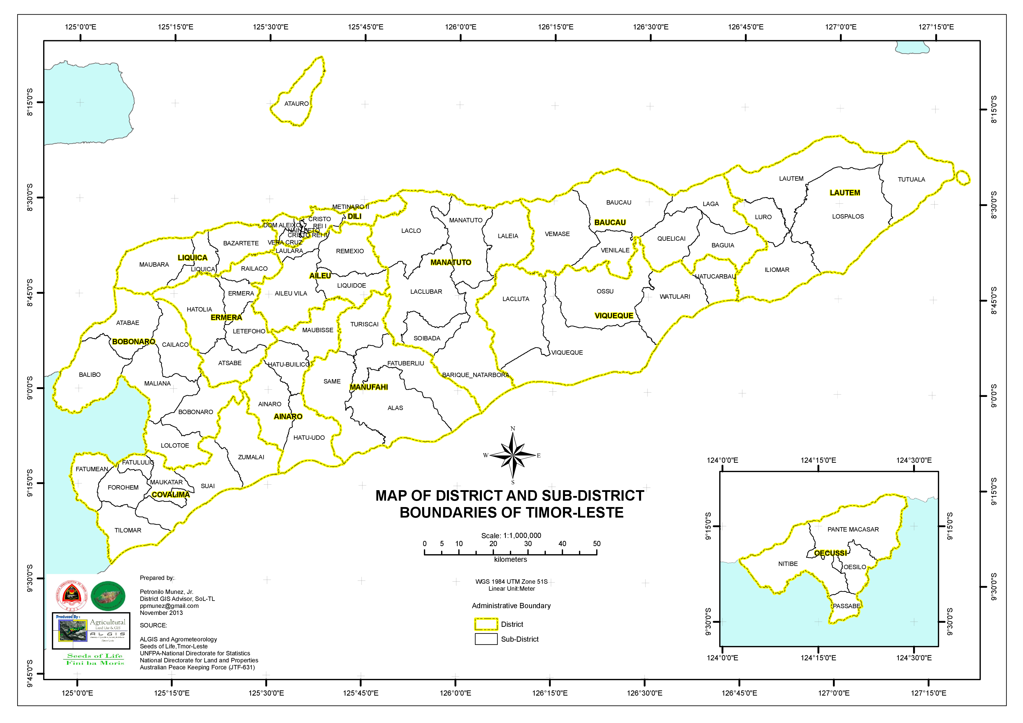 Grenzen der Distrikte und Subdistrikte Osttimors